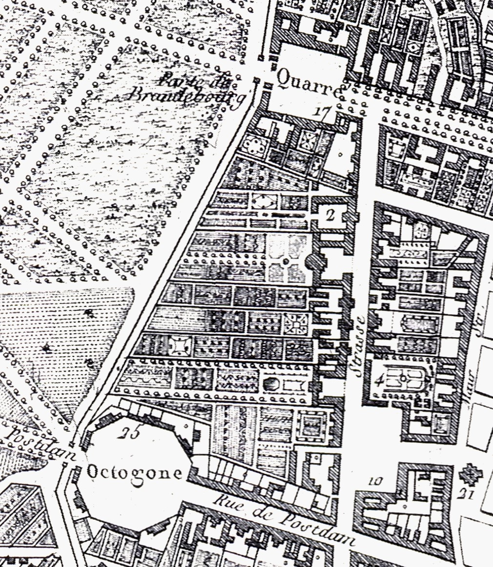 Berlin, minister gardens (Ministergärten) - detail of Plan de la Ville et des Fauxbourg de Berlin, engraving